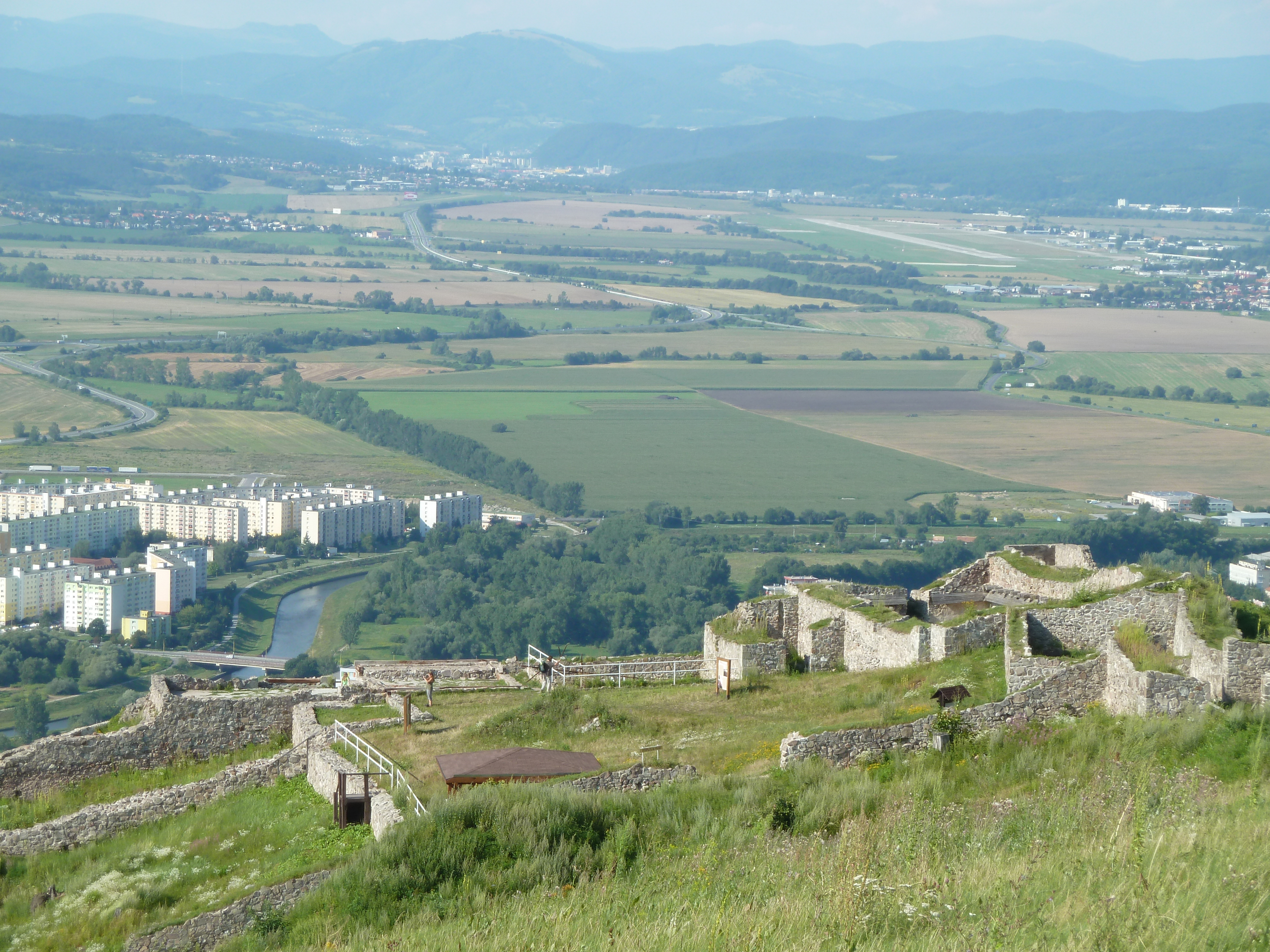 Pustý hrad a časť Zvolenskej kotliny